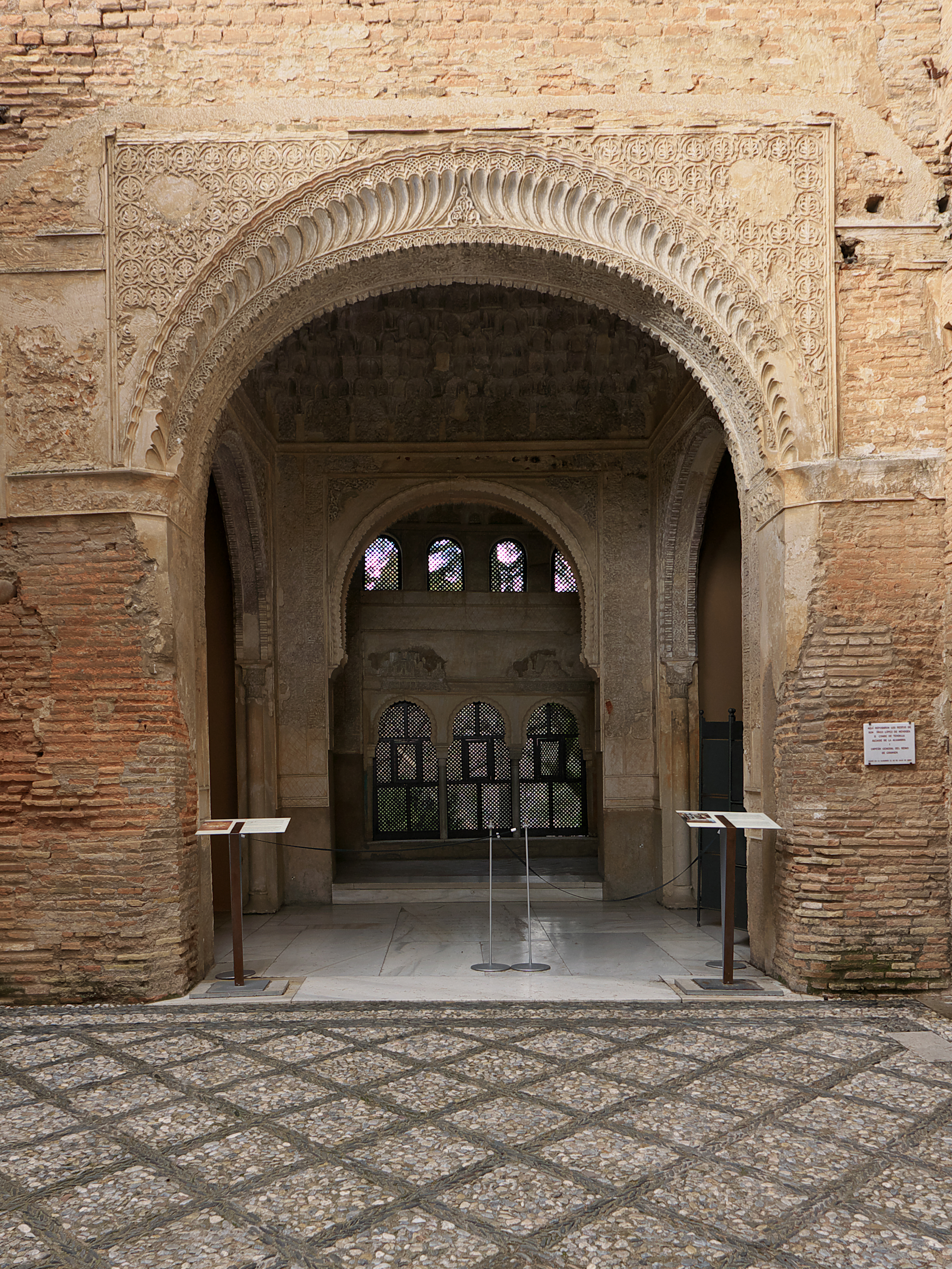 Estancia palacial en tiempos de Muhammad III.